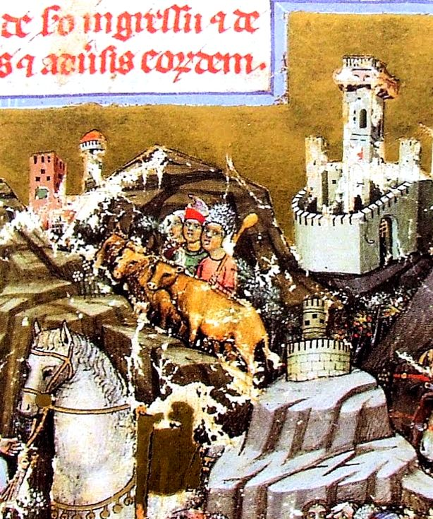 A magyarok bejövetele Pannóniába (részlet a Képes krónika egyik miniatúrájáról)